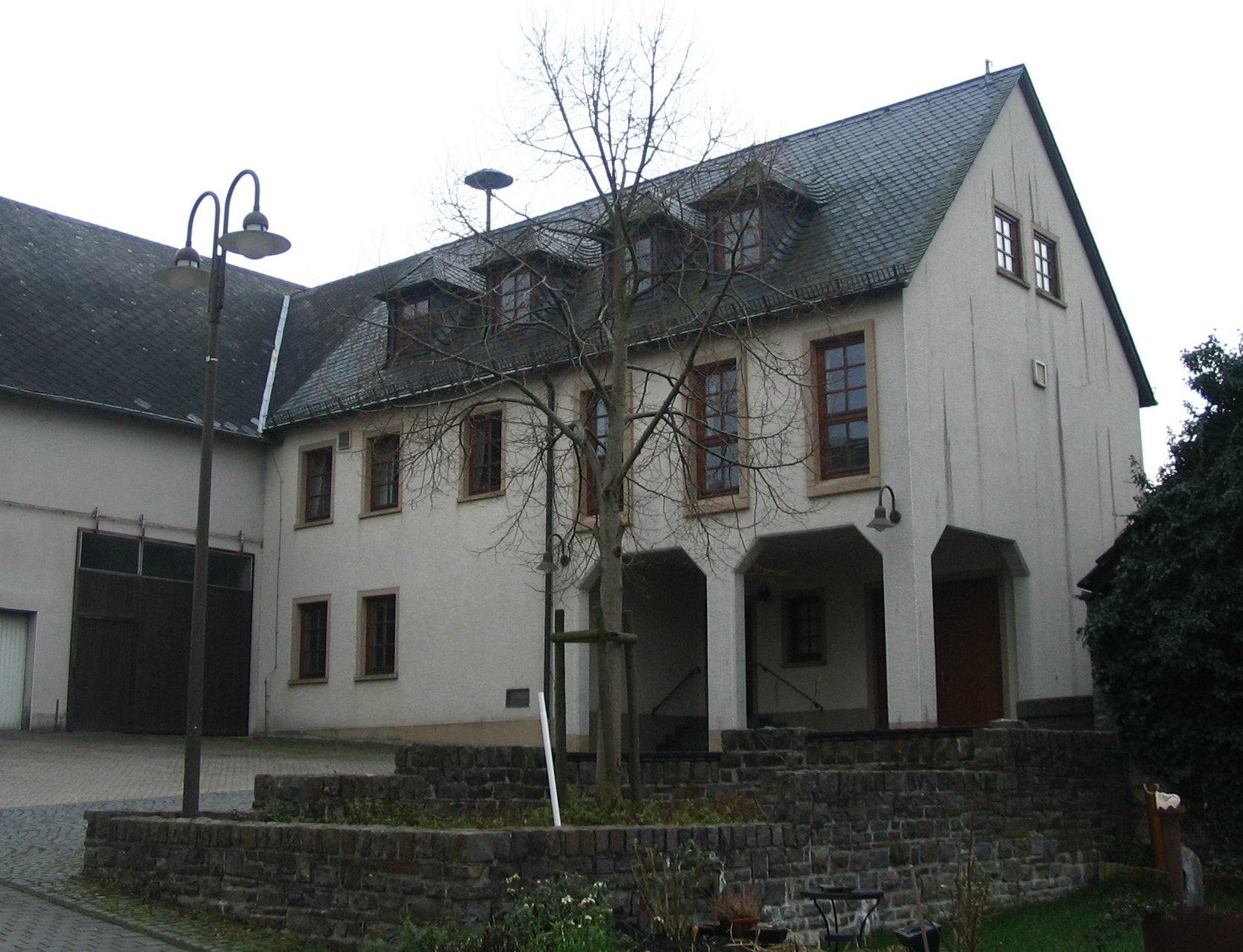 Bürgerhaus in Panzweiler im Hunsrück